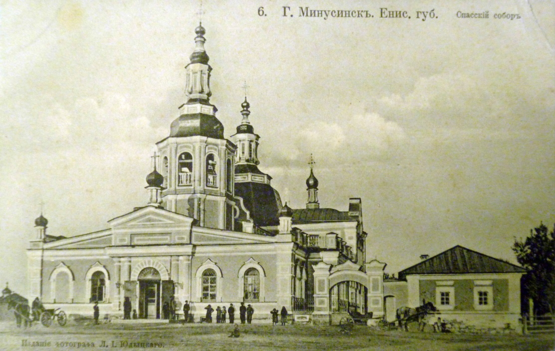 Минусинск. Спасский собор. 1803–1814 гг. Открытка начала ХХ в. МРКМ